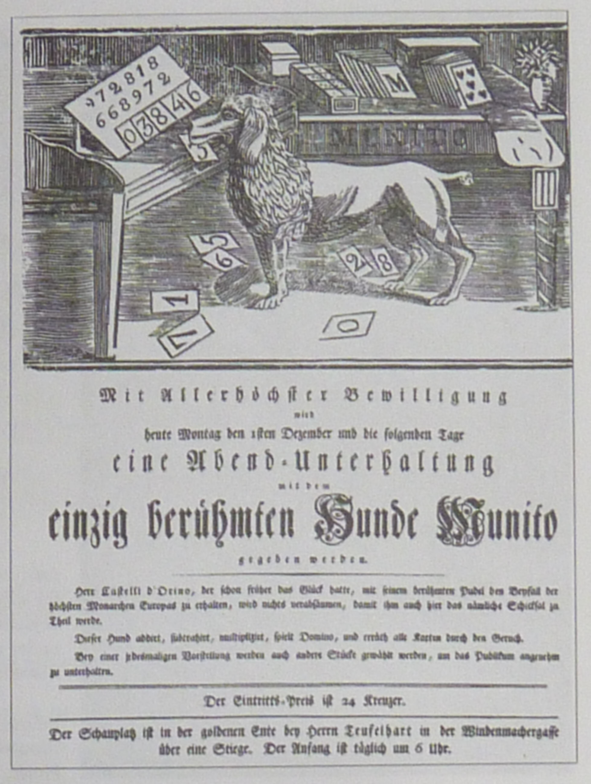 Werbung für Auftritte des Hundes Munito in Deutschland, hier in der "Goldenen Ente" in der Windenmachergasse in München